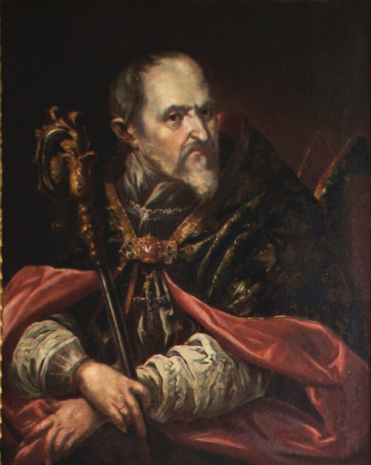 Porträtgemälde von Veit Adam von Gepeckh, Fürstbischof von Freising, im Fürstengang zwischen Fürstbischöflicher Residenz und Freisinger Dom.